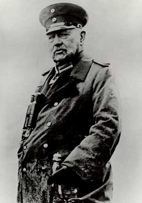 Пауль фон Гінденбург